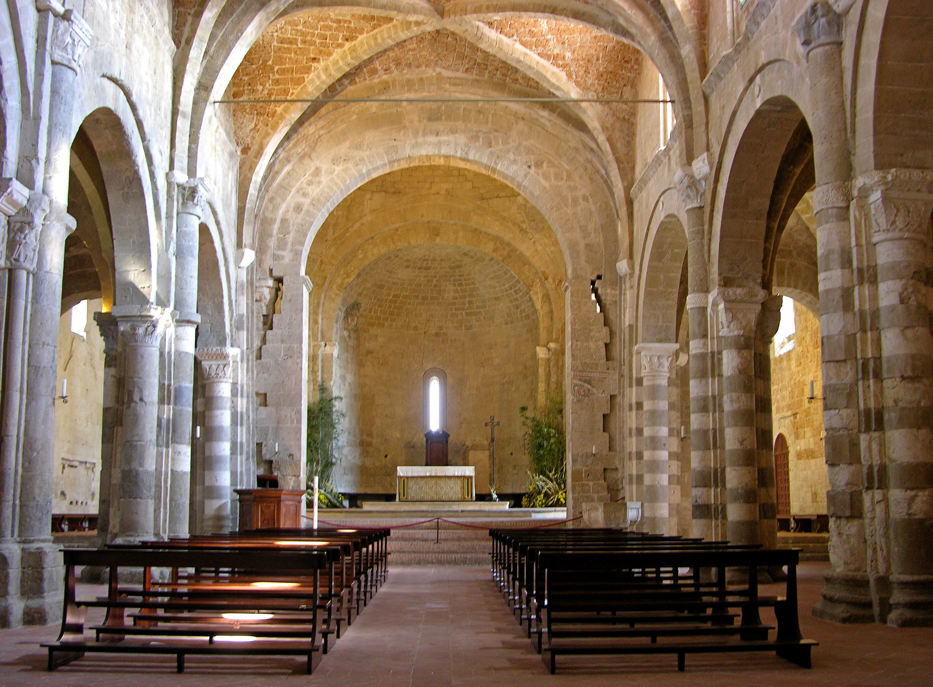 Interno de Duomo di Sovana (GR), Italy.